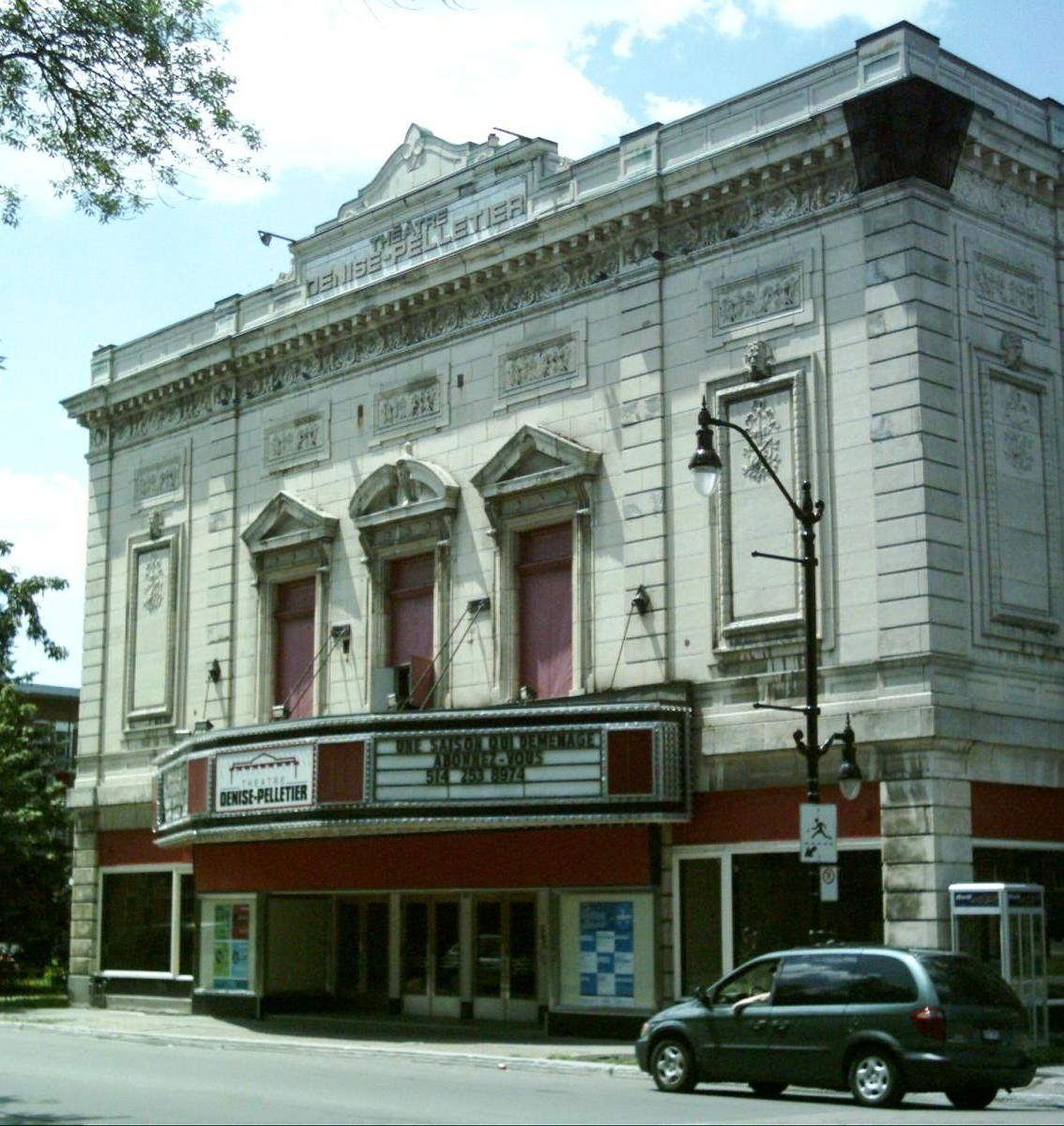 Le Théâtre Denise-Pelletier est situé au 4353 rue Sainte-Catherine est, dans le quartier Hochelaga-Maisonneuve à Montréal.